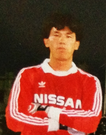 Shigetatsu Matsunaga en Nissan Motors SC